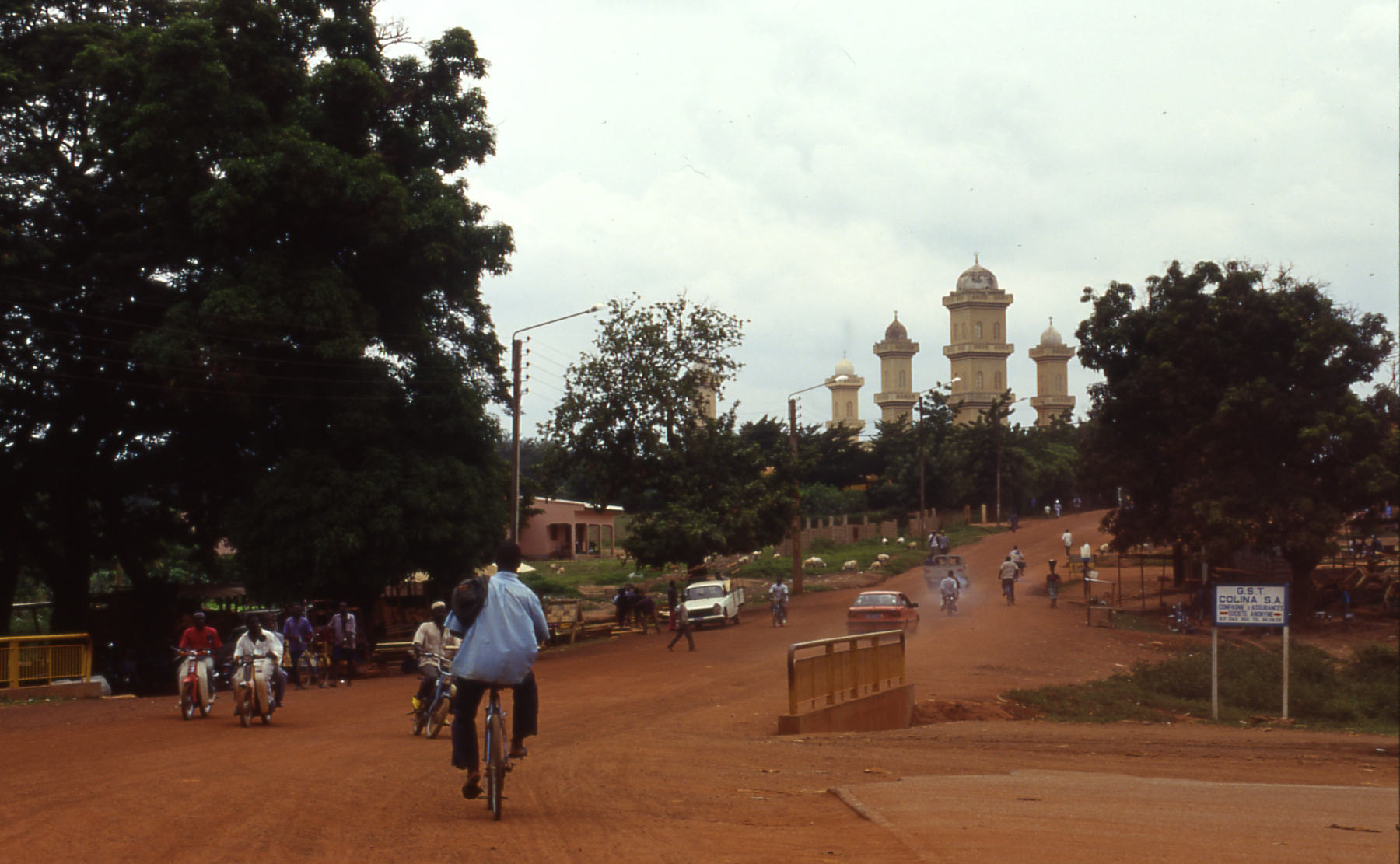 Korhogo (Côte d'Ivoire, 1995).